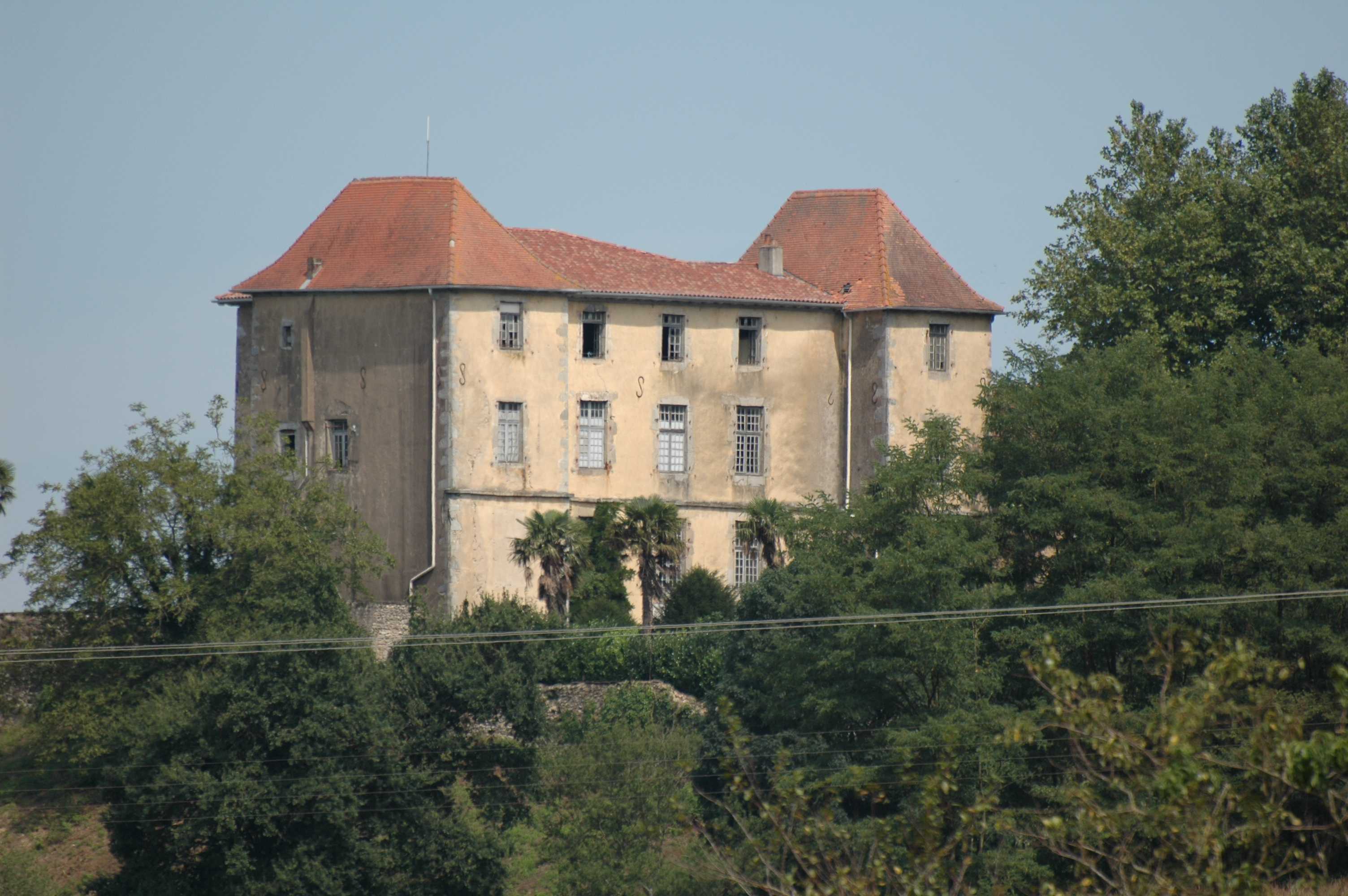 Mendionde, château de Garro